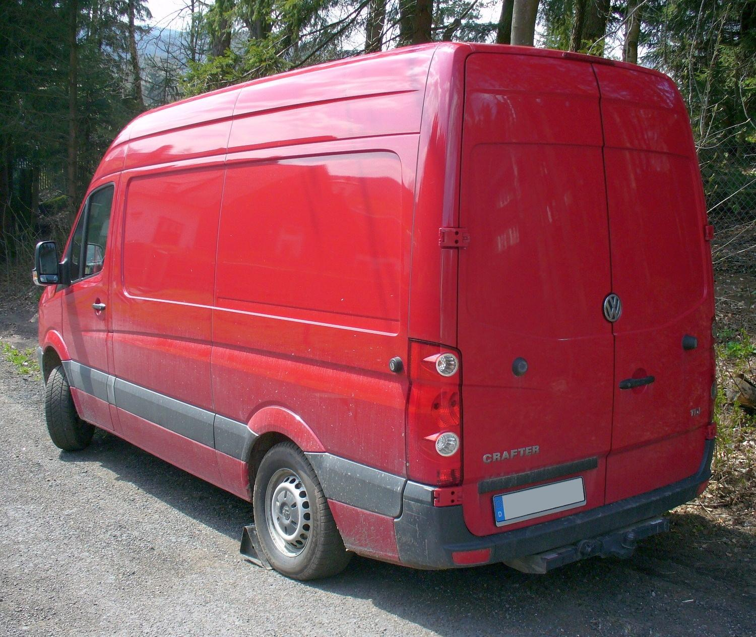 VW Crafter